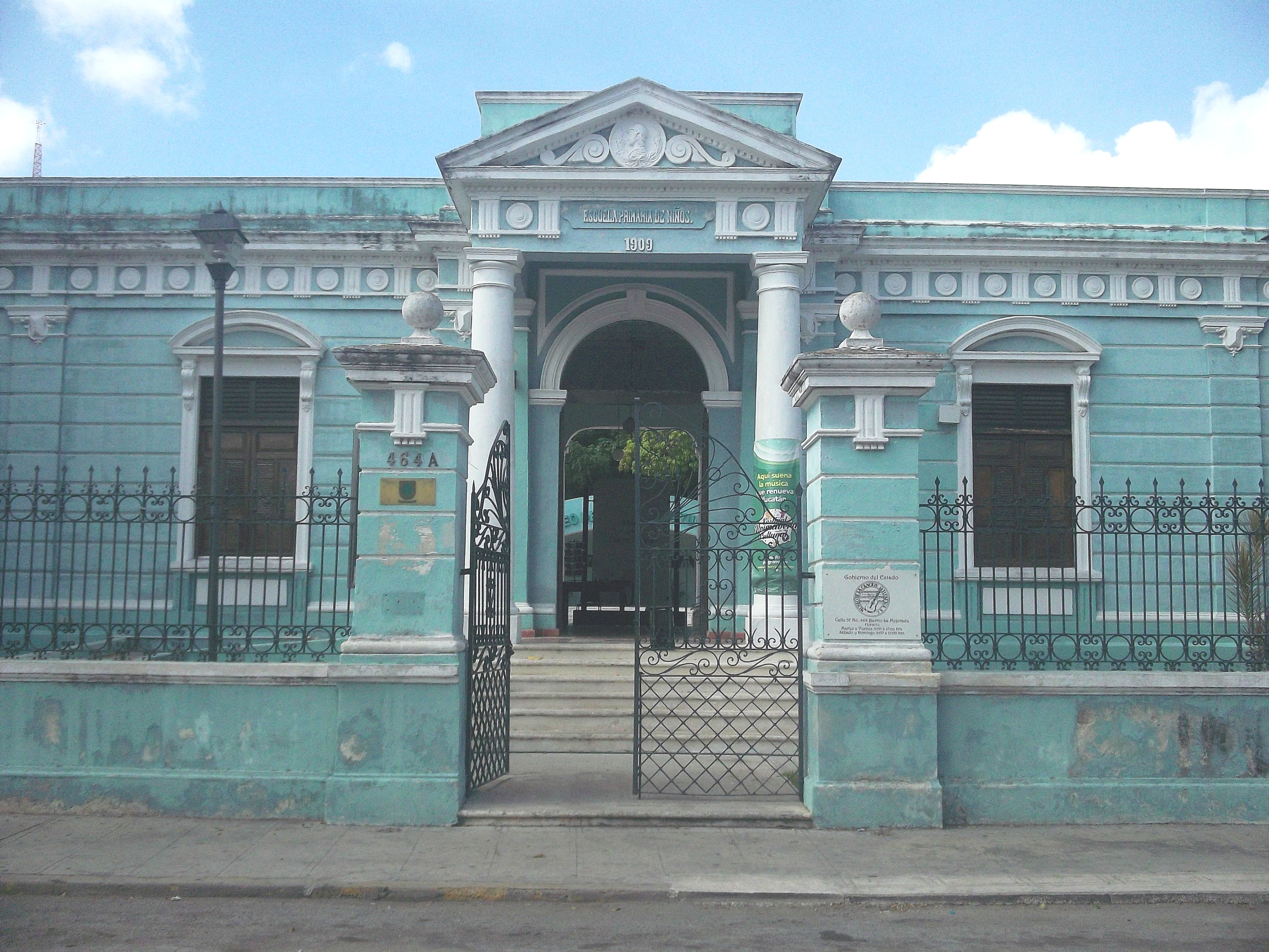 Museo de la Canción Yucateca en Mérida, Yucatán